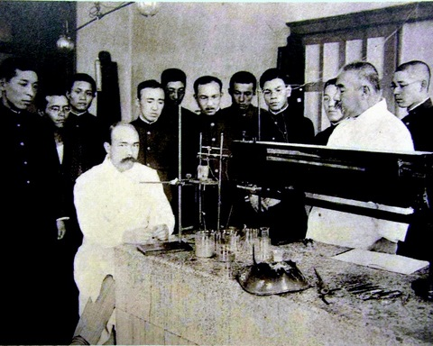 髙橋順太郎教授（右）林春雄教授（左）大正7年（1918年）薬物学教室 実習風景